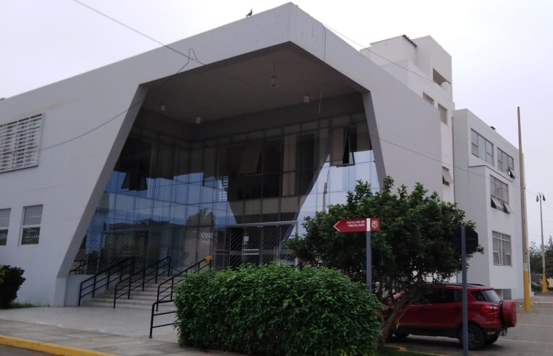 UNMSM Facultad de Psicología 2019 - Vista posterior